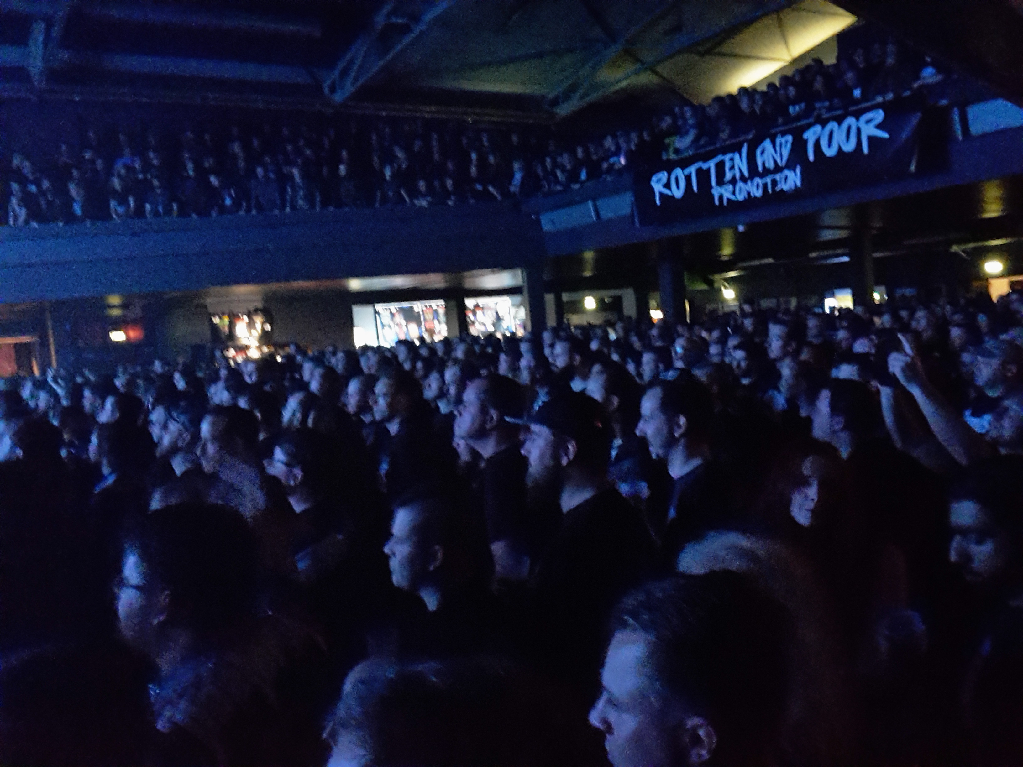 Blick ins Publikum bei einem Konzert von Kreator in der Columbiahalle